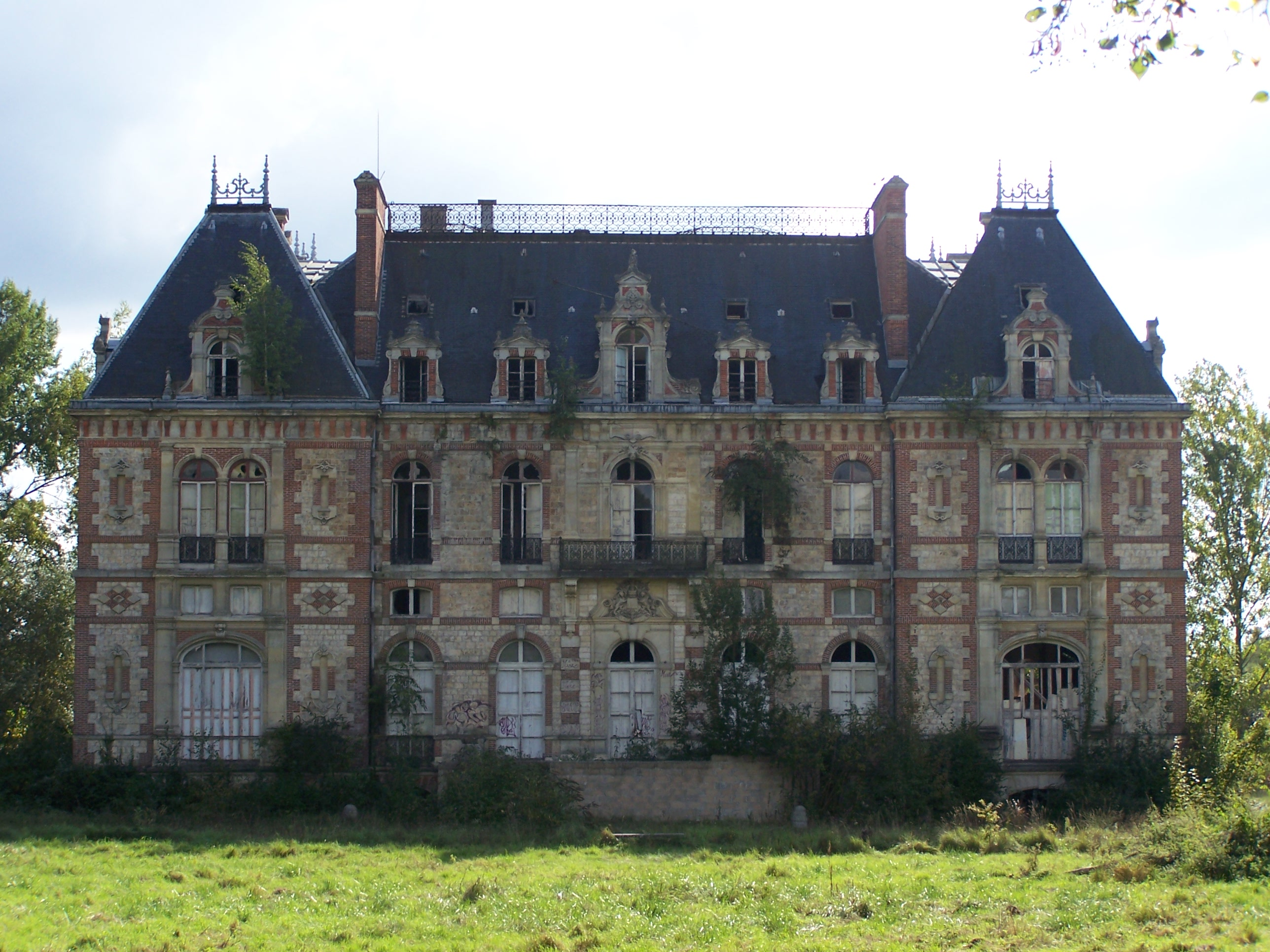 Château de Bonnelles (Yvelines, France)